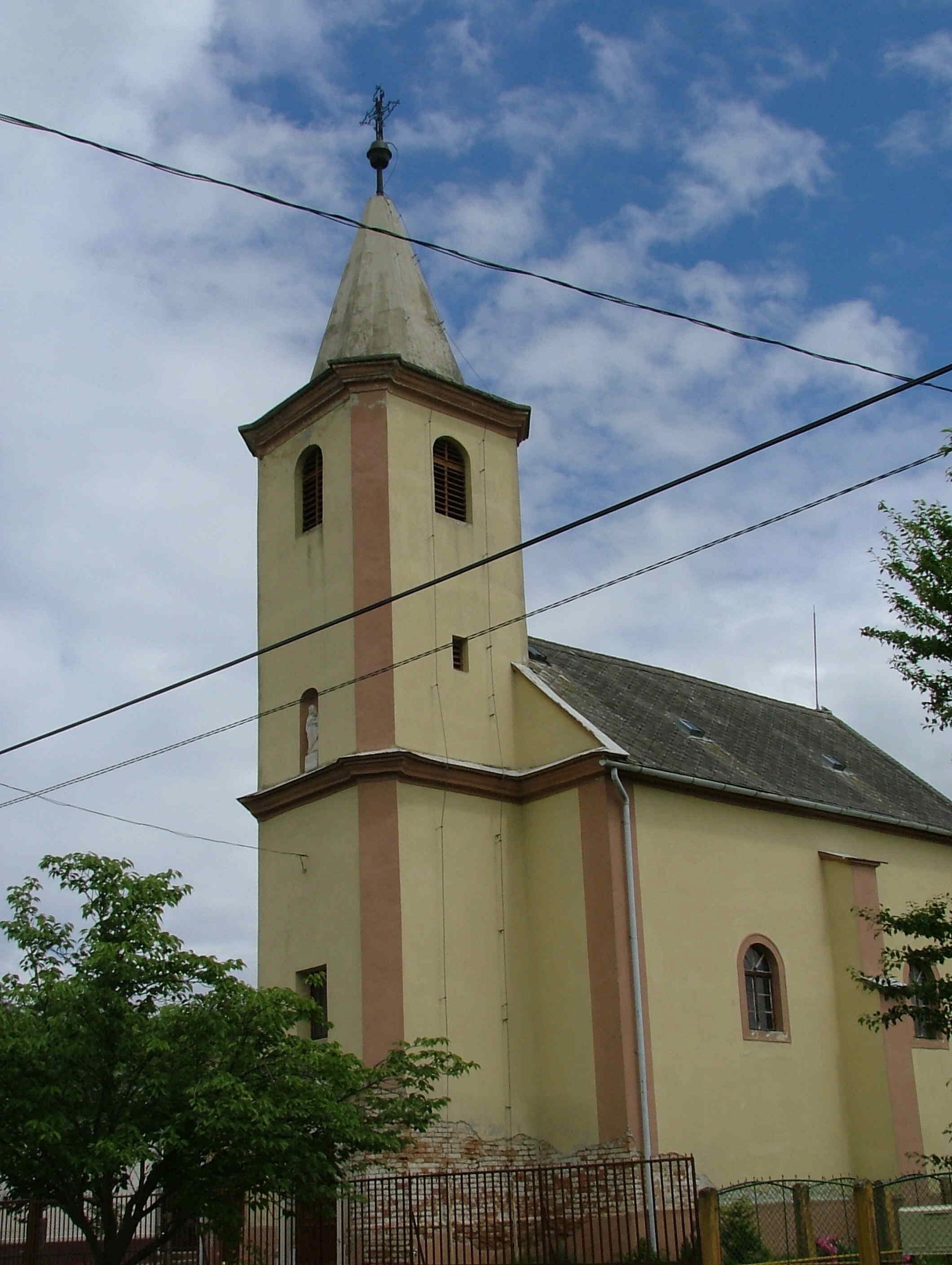 Katholische Kirche Kemenespálfa